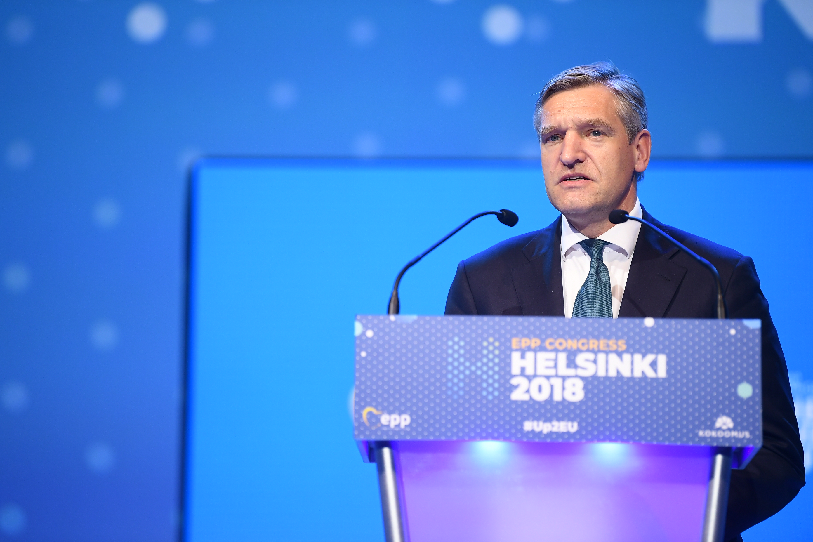 AAA_2075